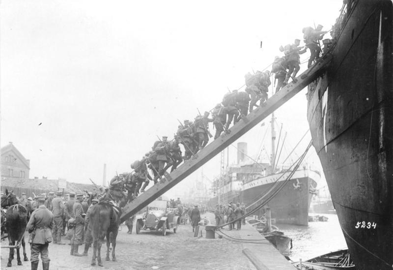 Zur Besetzung der Insel Ösel Truppen gehen im Heimathafen an Bord eines Transportdampfers